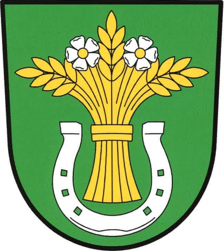 znak, Kvítkovice, okres České Budějovice